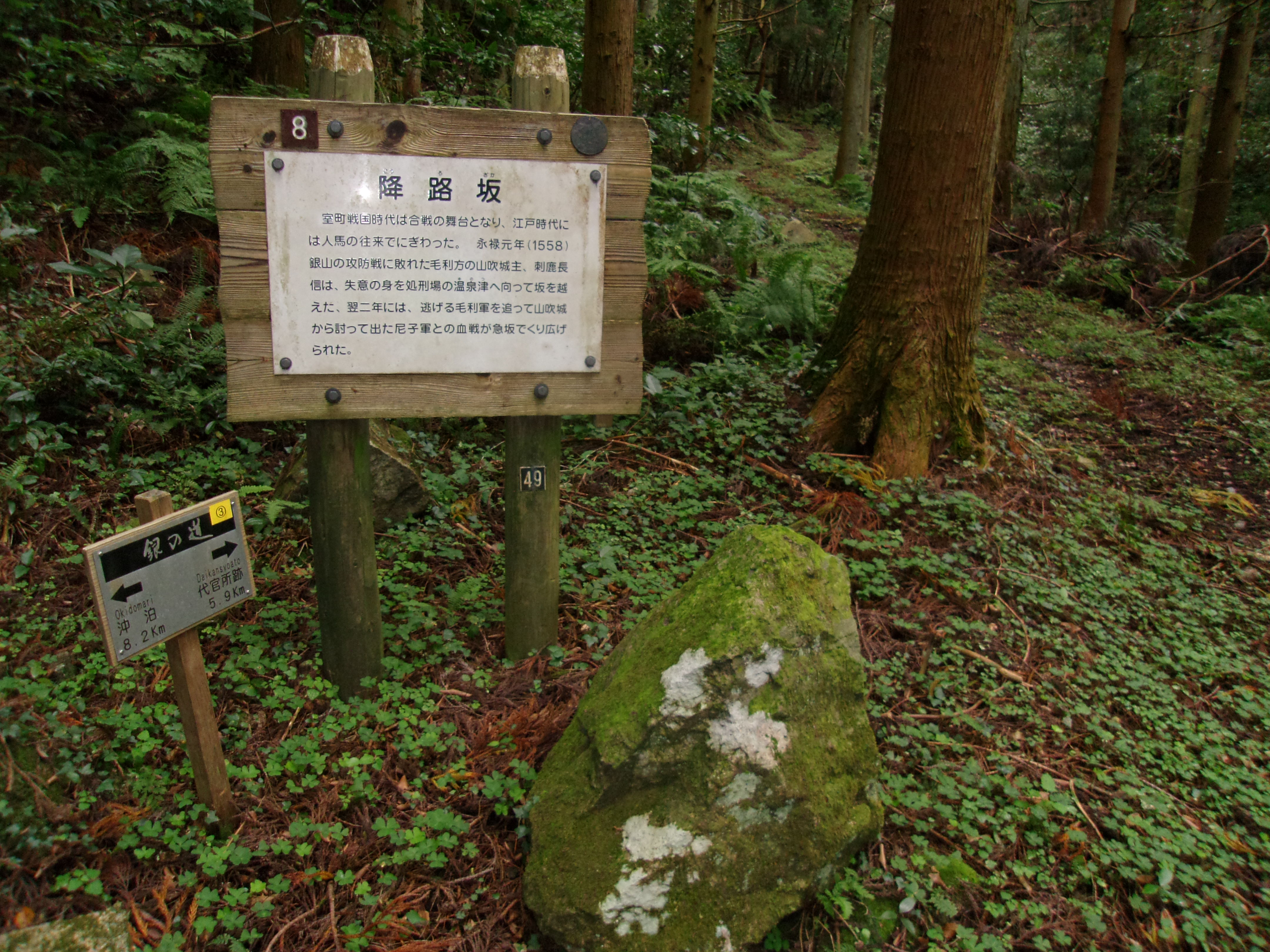 世界遺産「石見銀山」の構成資産である銀山街道温泉津沖泊道 降路坂の説明板